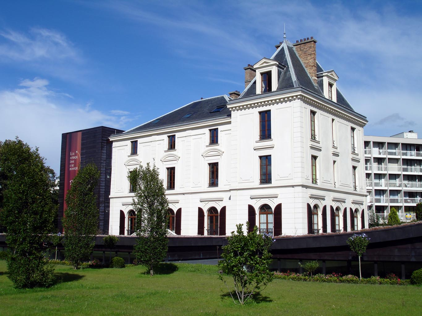 La maison Suger à Franconville (Val-d'Oise), France Siège de l'école Municipale de Musique, de Danse et d'Art Dramatique Juillet 2007 Photo personnelle (own work) de Clicsouris